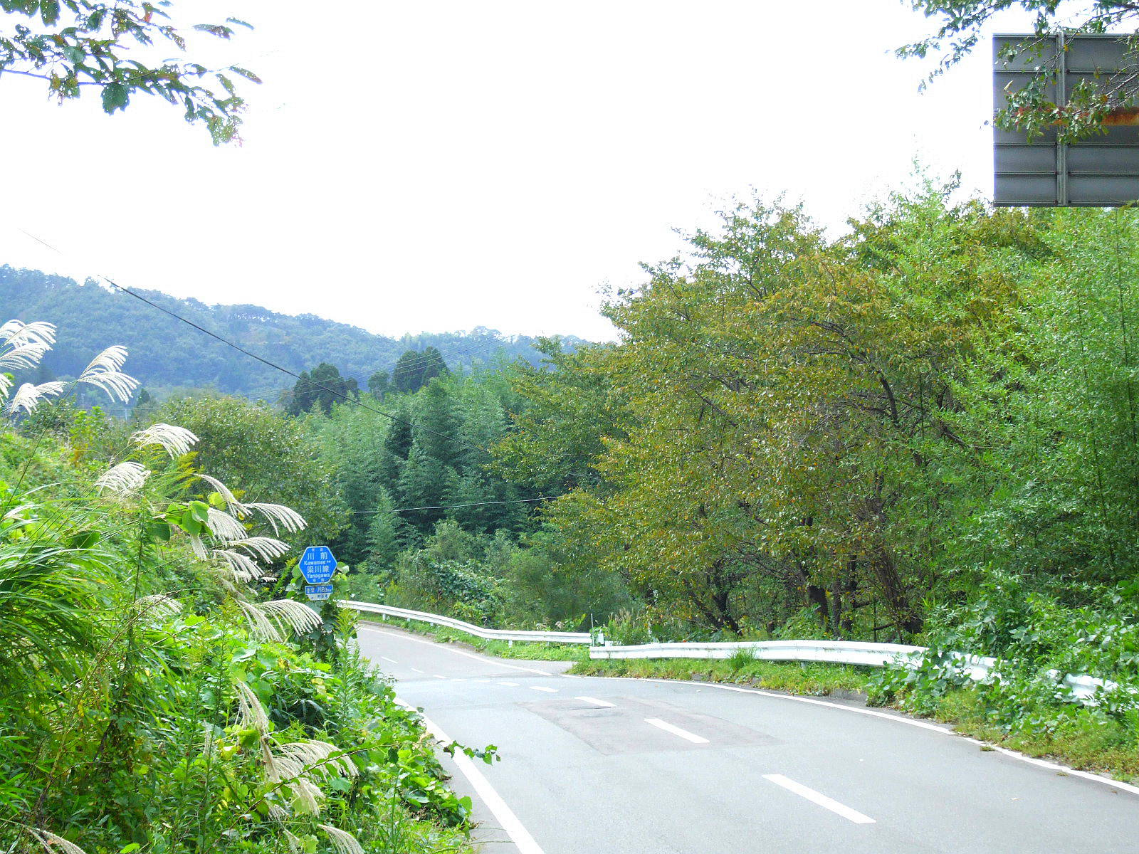 Fukushima Prefectural Road 104 Kawamae-Yanagawa Line. Date, Fukushima prefecture, Japan.